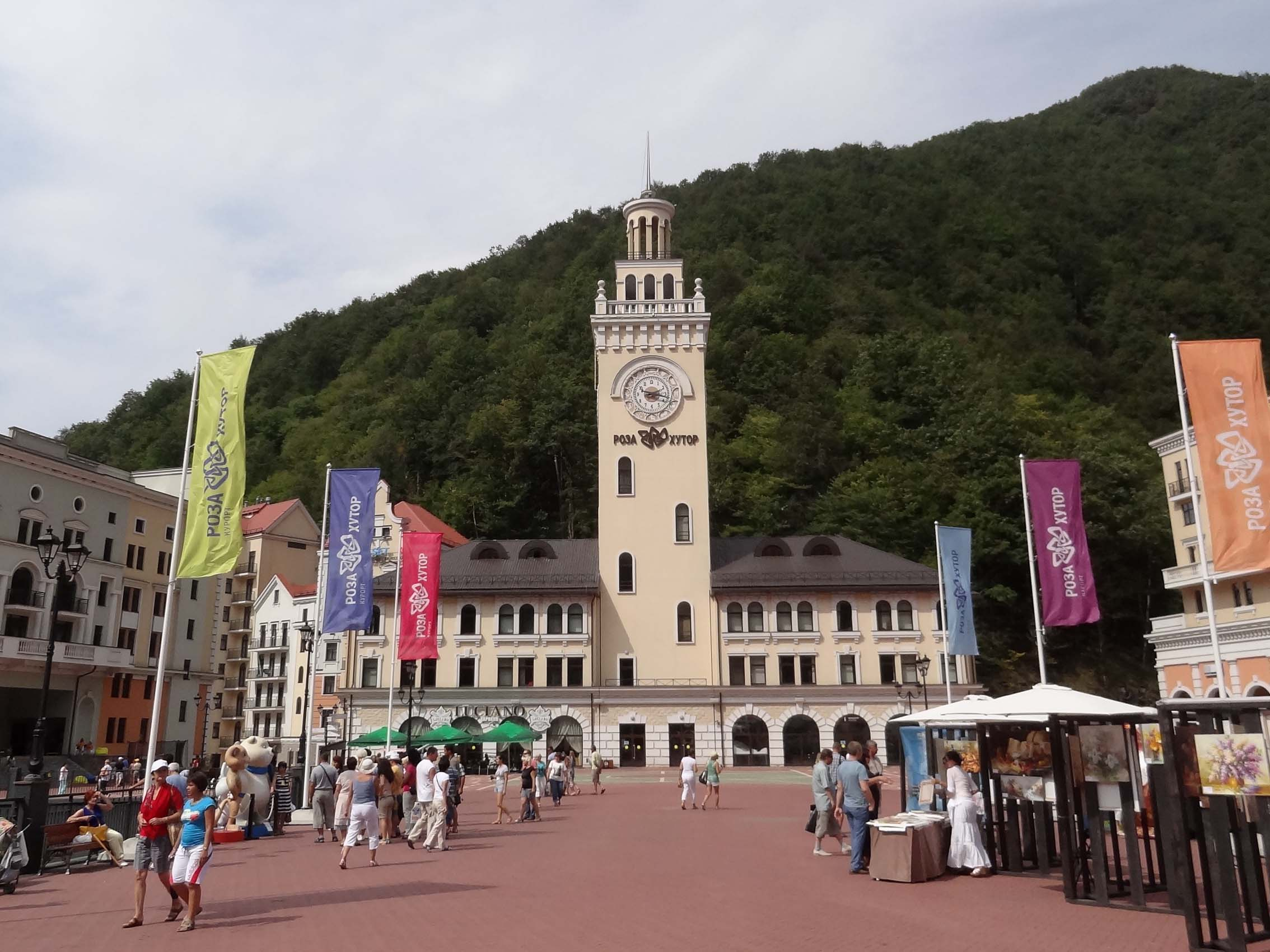 Горнолыжный курорт Роза Хутор, башня здания «Ратуши». 7 сентября, 2014 год.